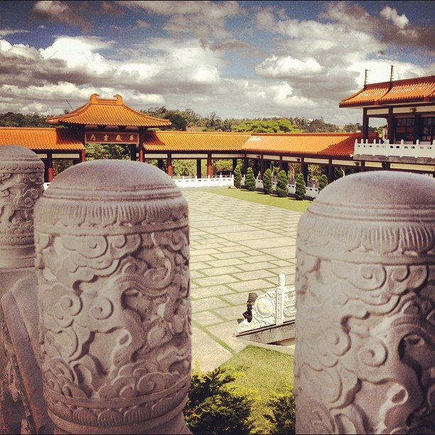 Zu Lai